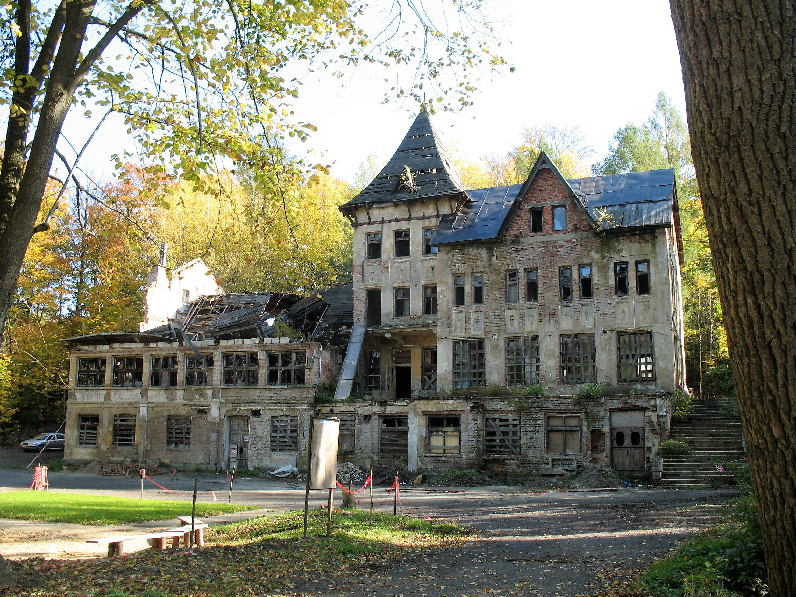 Budova bývalých slunečních lázní v Karlově údolí u Šluknova